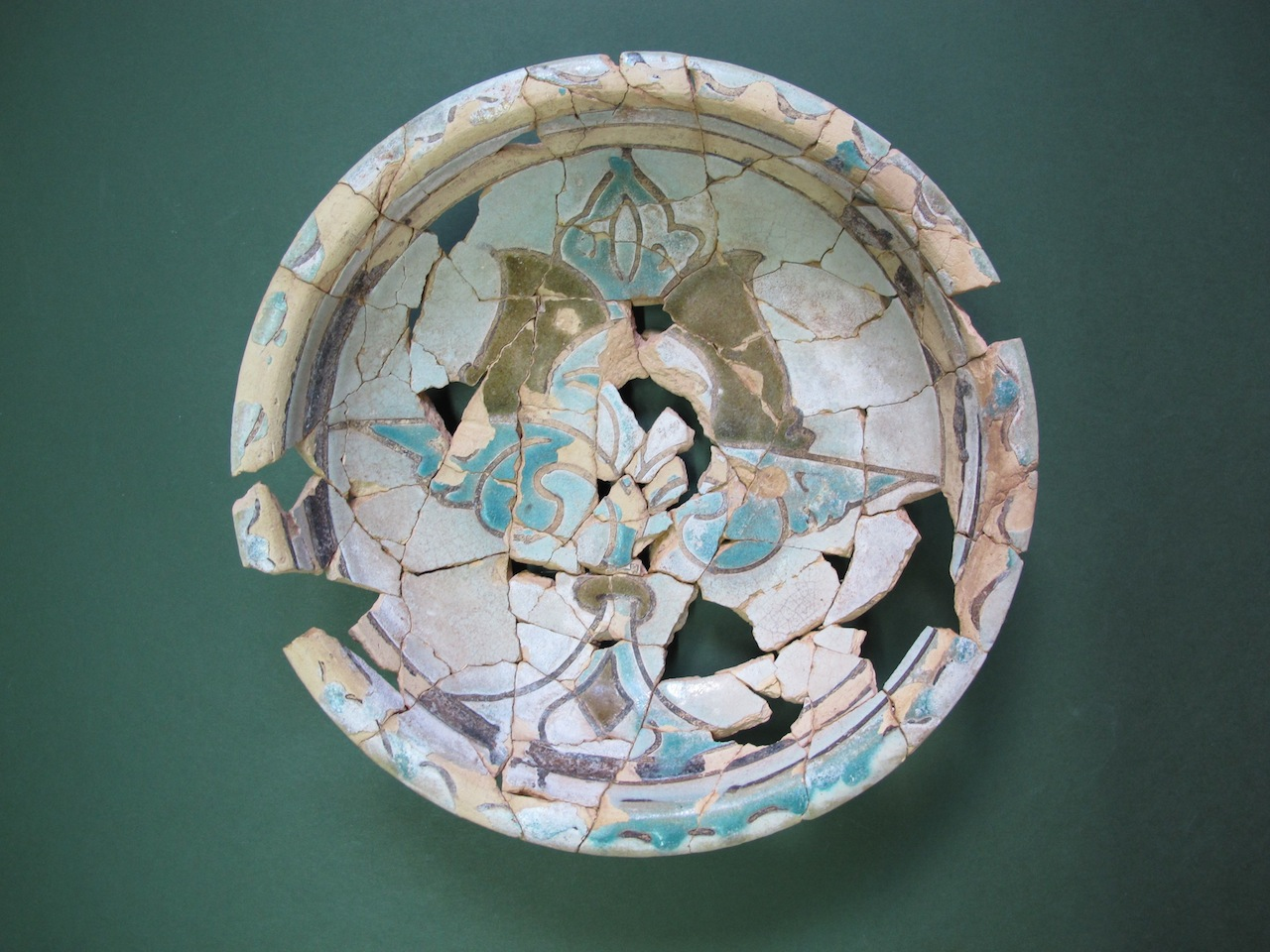 Anvers del plat